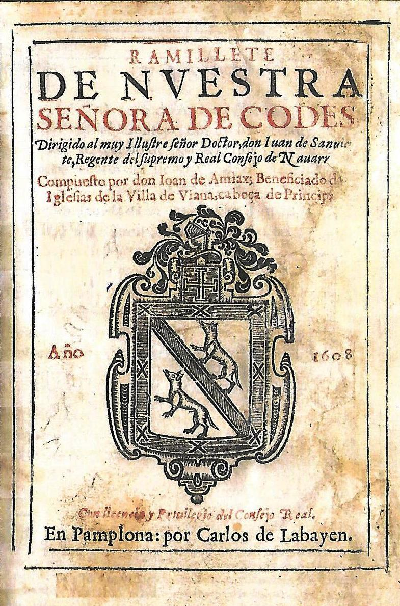 Ramillete de Nuestra Señora de Codés, Juan de Amiax, Carlos Labayen, Pamplona, 1608